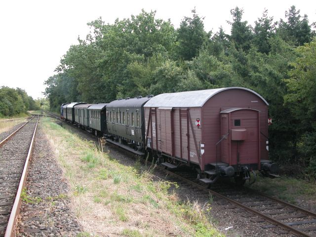 Bahnhof Kiel-Oppendorf